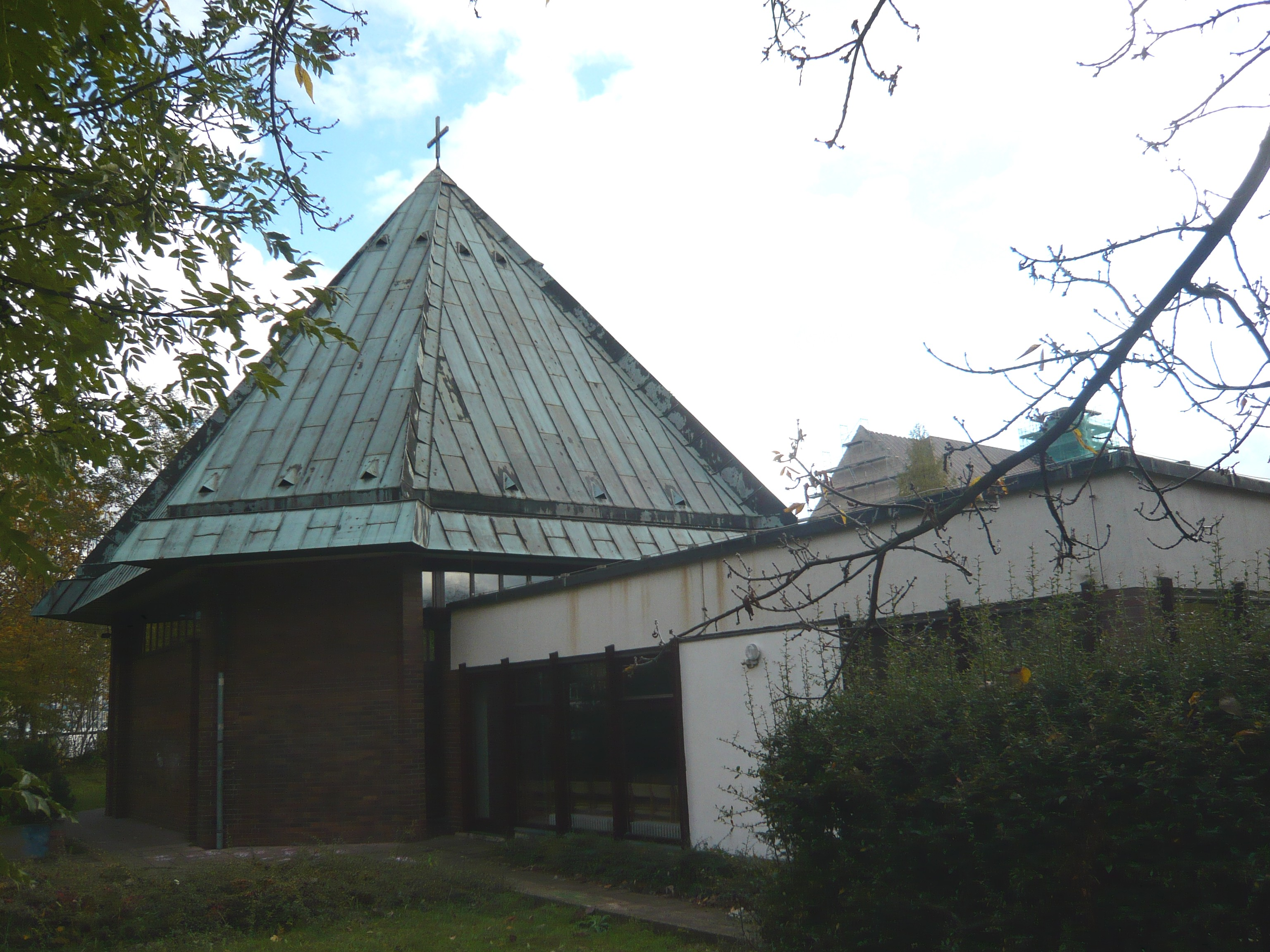 evangel. Gemeindezentrum Fennpfuhl